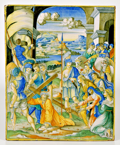 "Lo spasimo". Placca istoriata dipinta da Nicola da Urbino. Urbino. 1525 c.